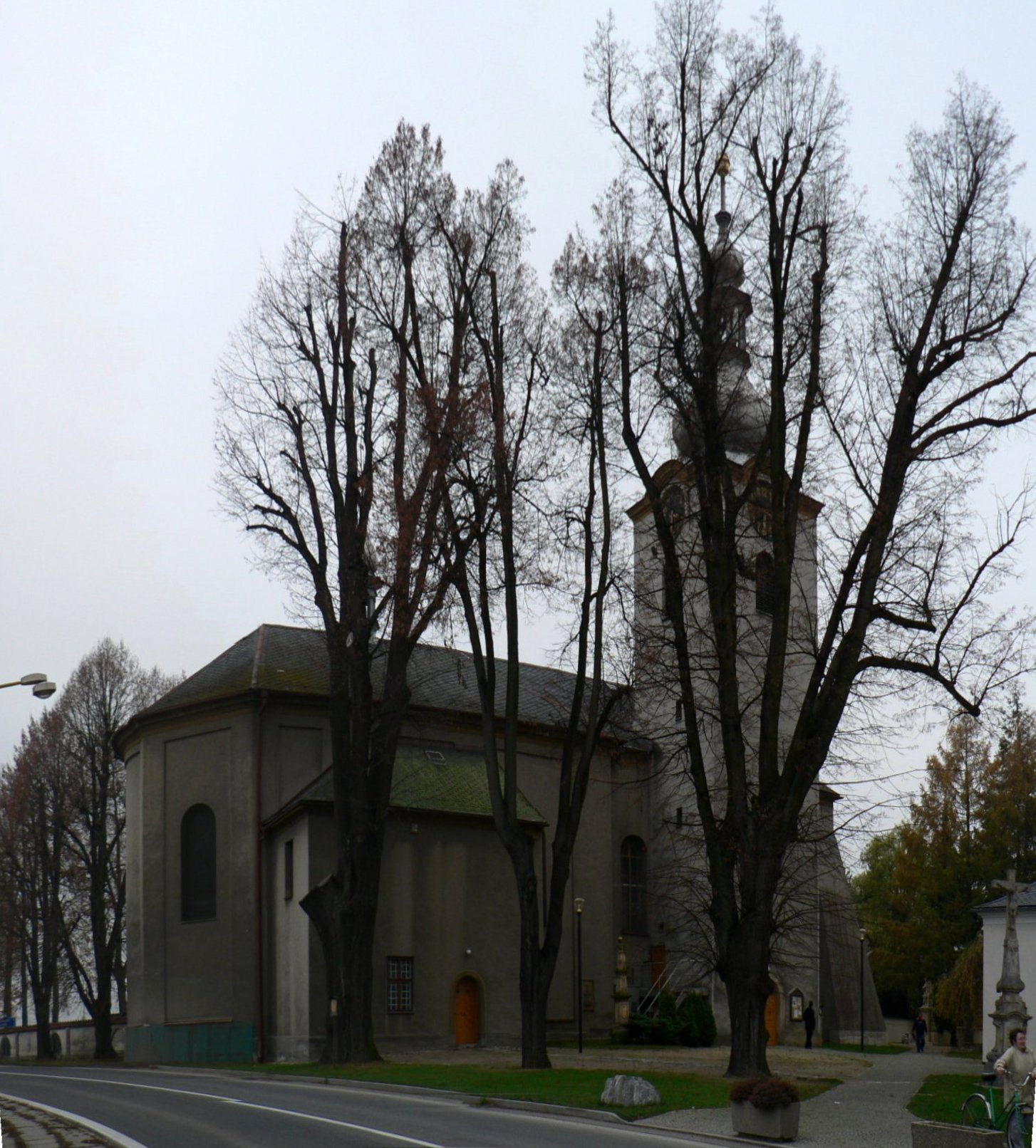 Kostel svatého Matouše (Postřelmov)